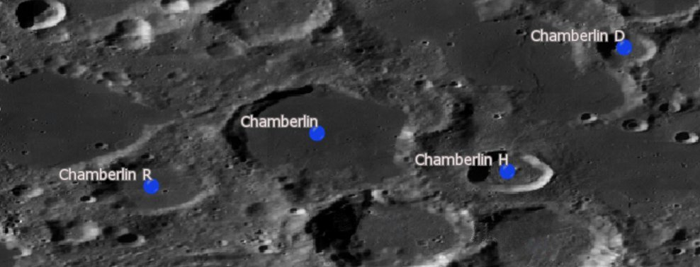 Cráter Chaberlin (LRO). Cráteres satélite